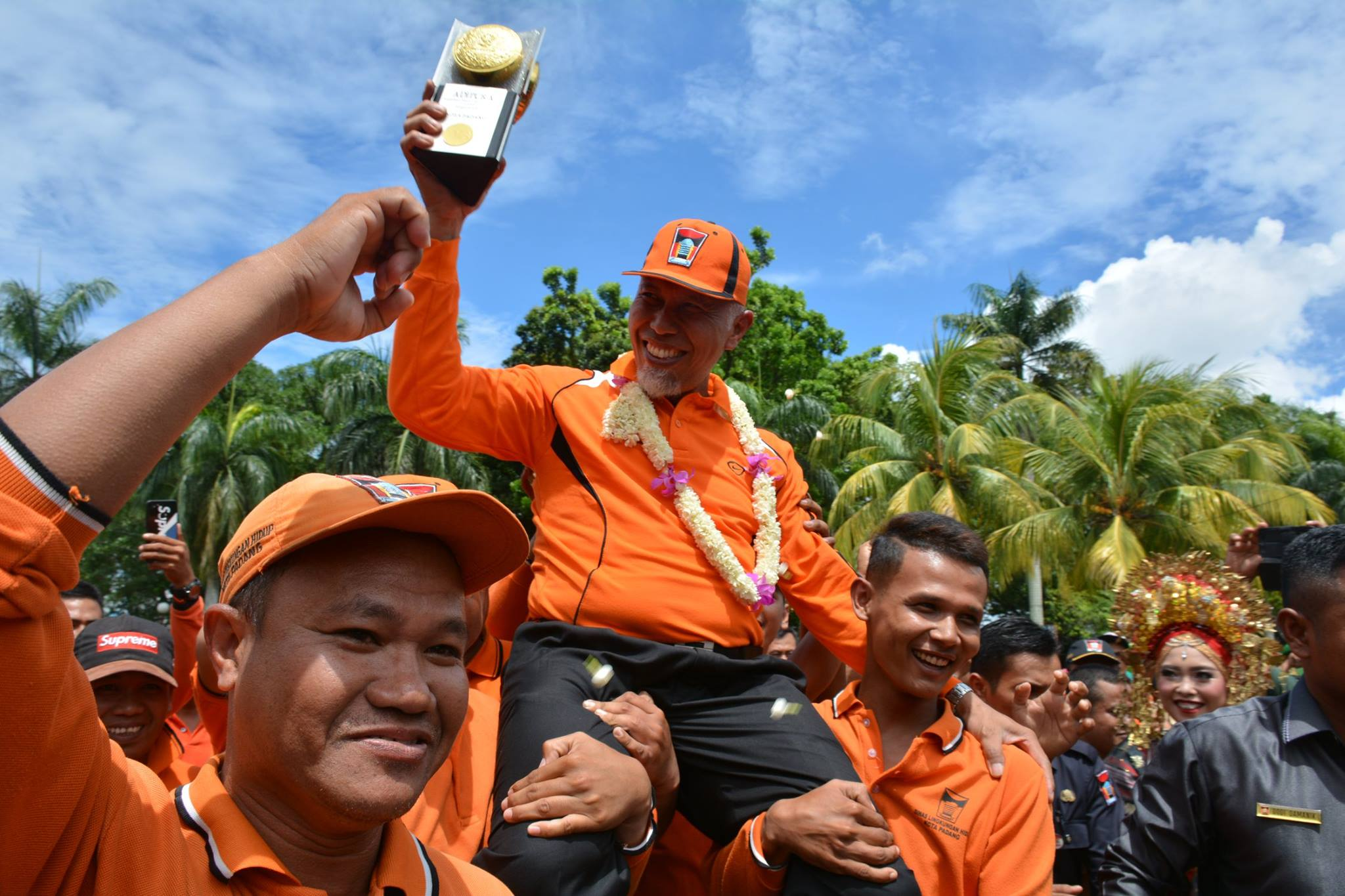 Mahyeldi diarak setelah pencapaian Padang meraih Adipura